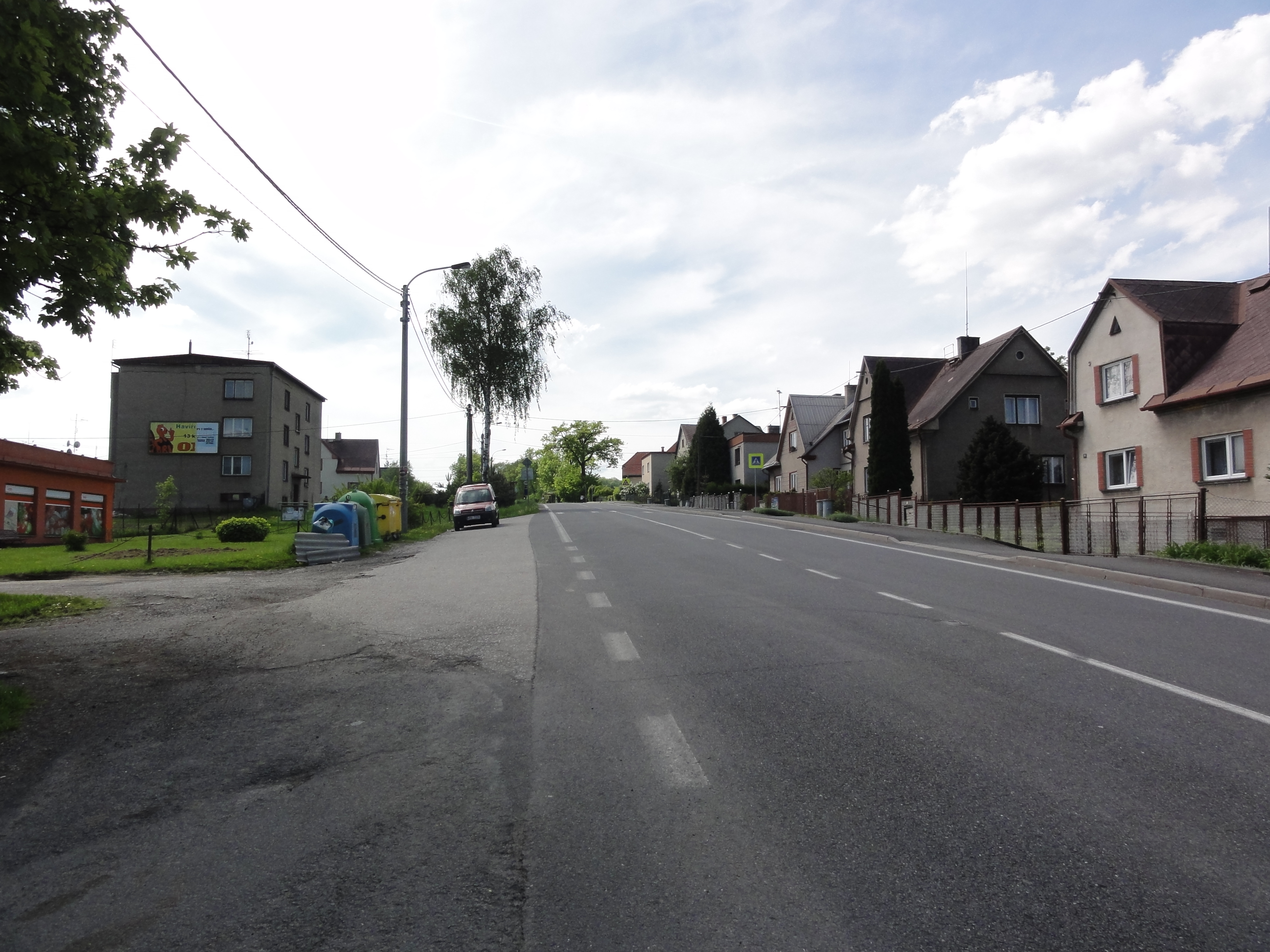 Czeski Cieszyn, Stanisłowice, droga I⁄11